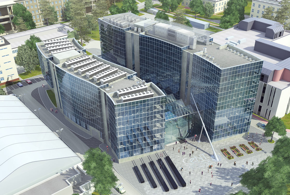 projekt CENT I UW